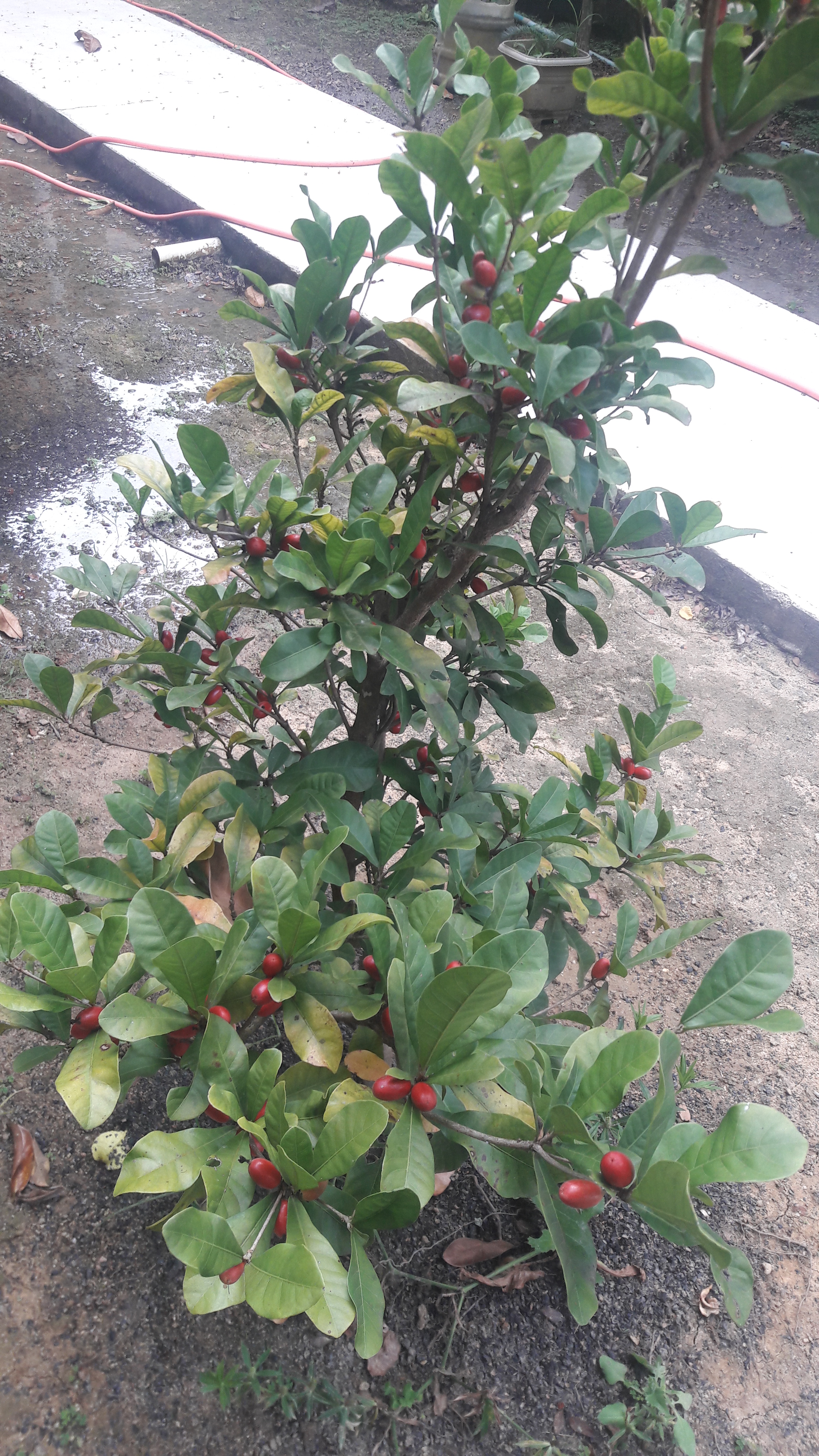 Pé de fruta do milagre em Governador Lindenberg (ES)